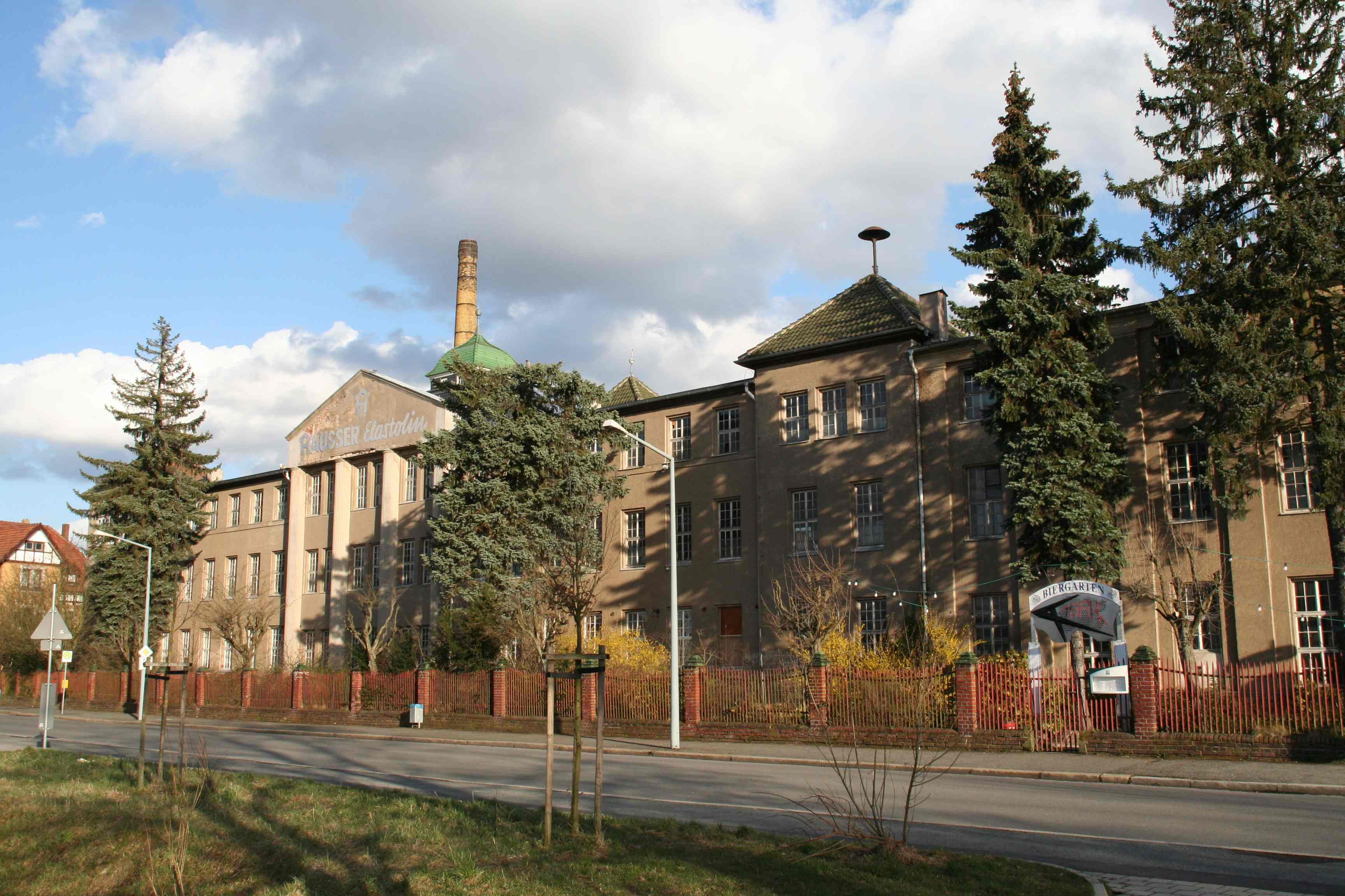 Ehemaliges Werk 1 von Max Oscar Arnold bzw. von O. & M. Hausser in der Bahnhofstr. in Neustadt bei Coburg